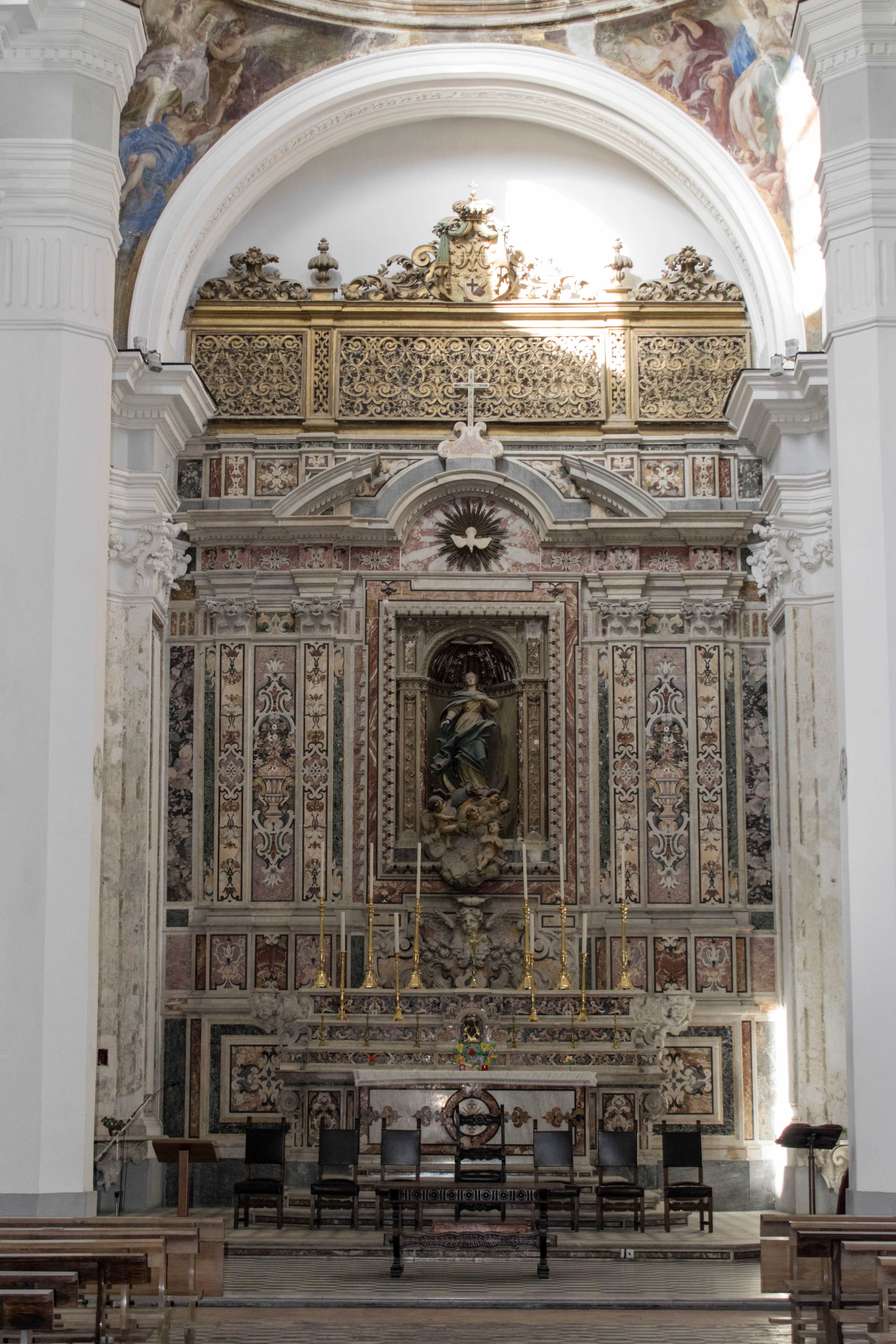 Santa Maria Donnalbina